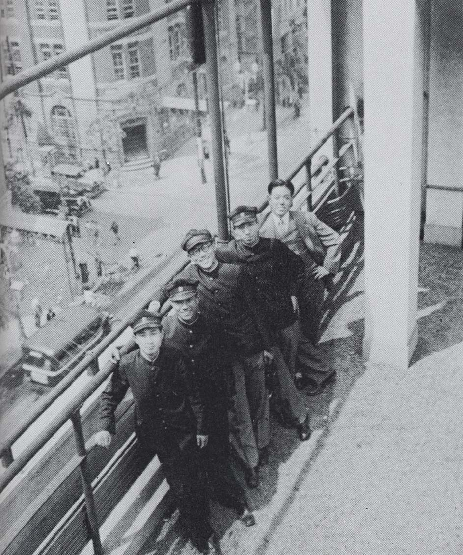 東京慈恵会医科大生